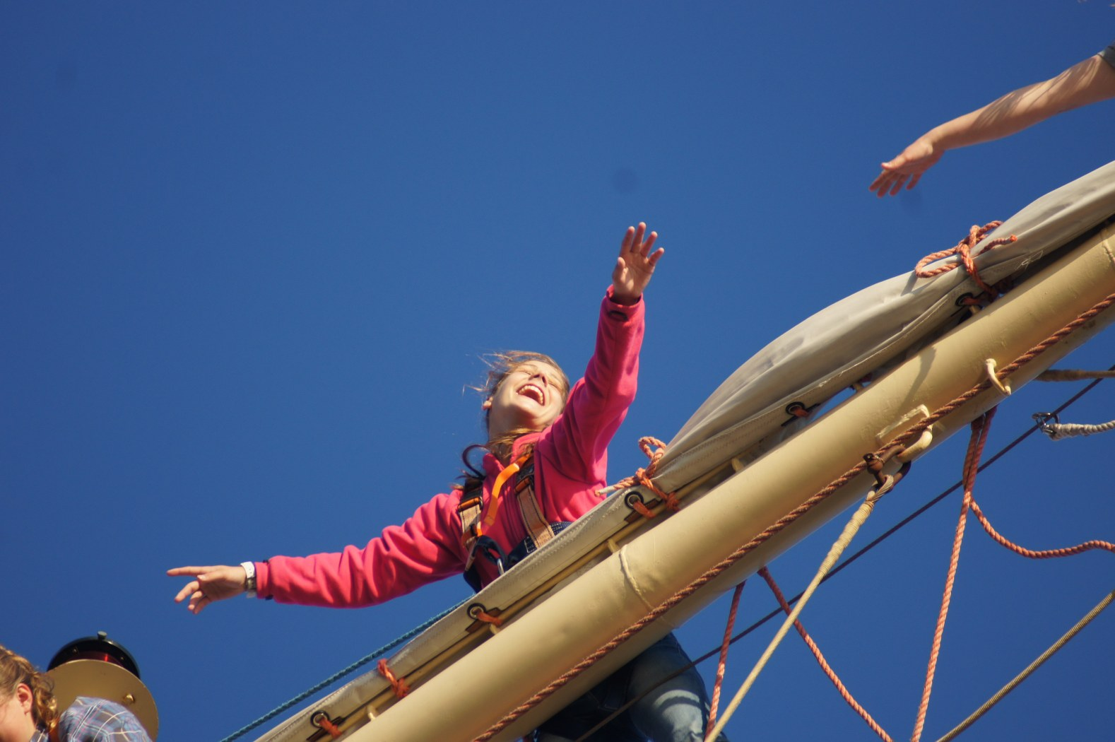 Szkoła pod Żaglami Krzysztofa Baranowskiego - taniec na rejach